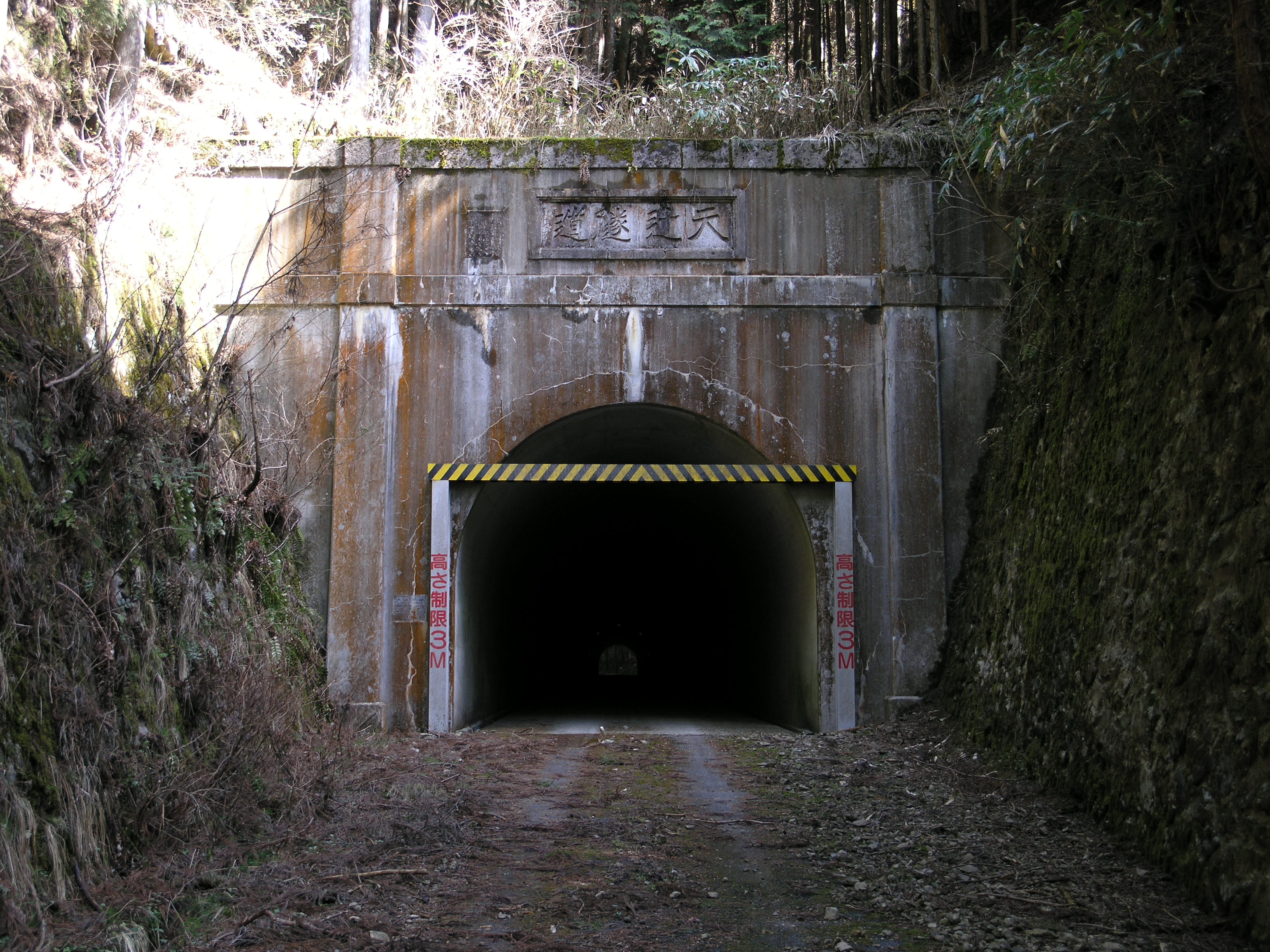 旧天辻隧道 南側（五條市大塔町）